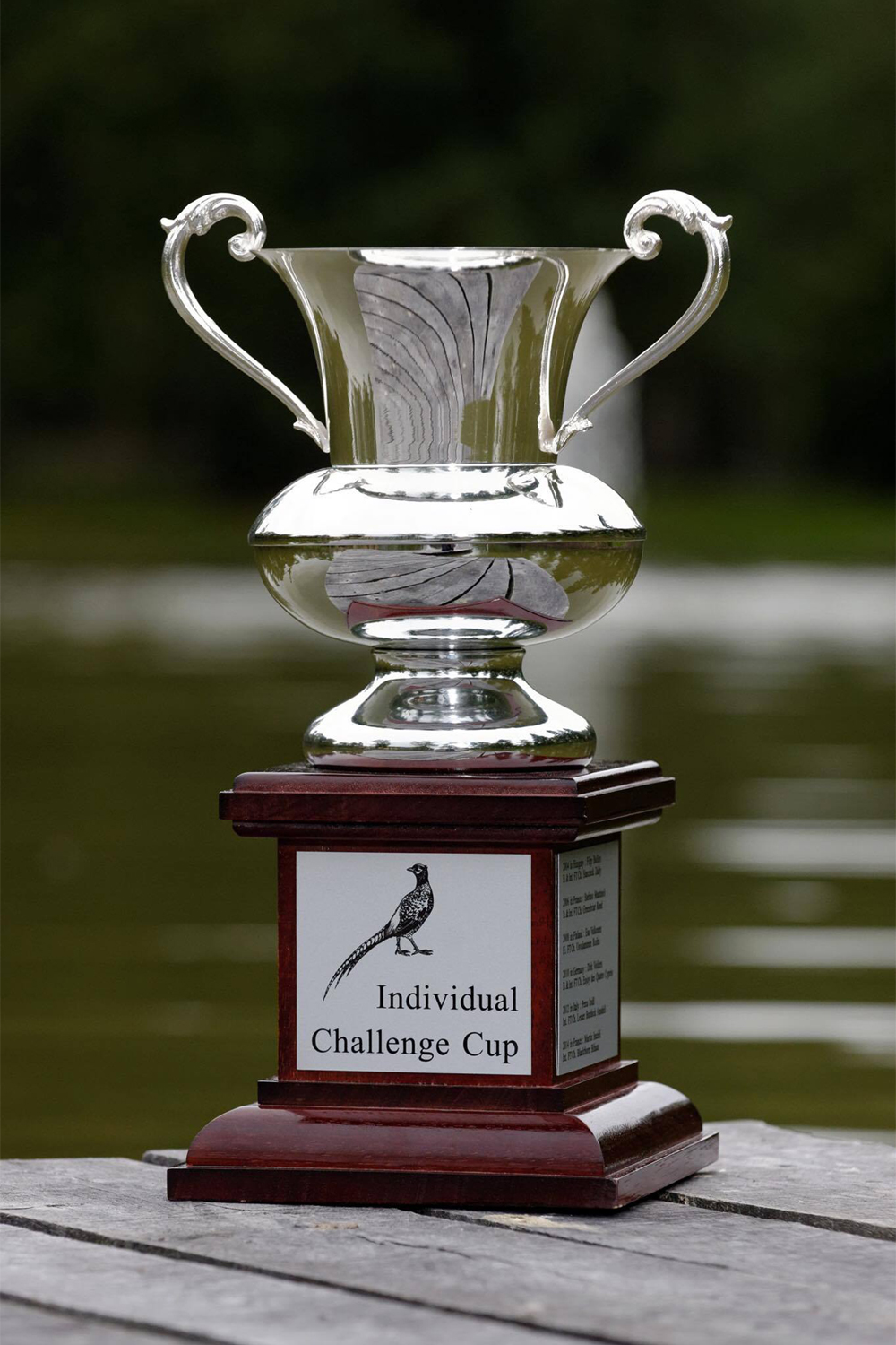 Pohár pro vítěze ICC